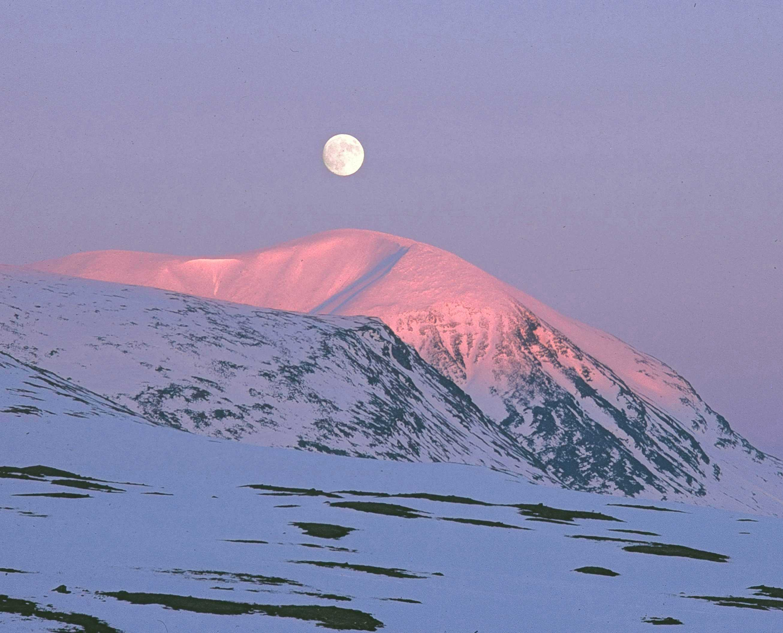 Singitjåkkå, Kebnekaise